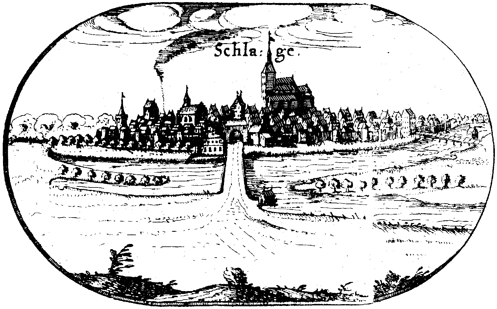 Rycina miasta Sławno z mapy Lubinusa - Mapa księstwa pomorskiego z 1618 roku.